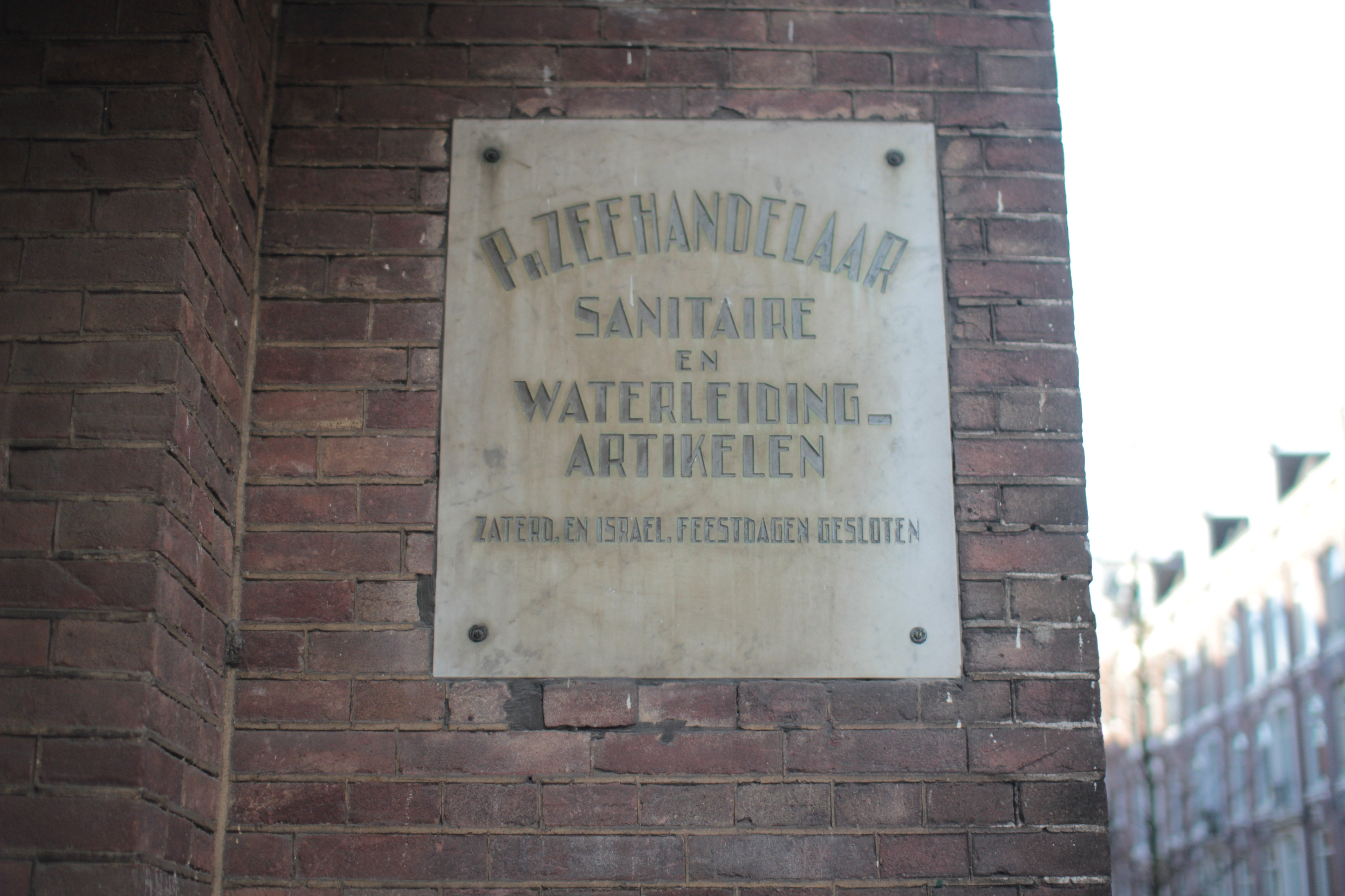 Gevelsteen in het pand 2e Jan Steenstraat 112 te Amsterdam, die de negotie van dhr. P. Zeehandelaar aankondigt. De inscripttie is als volgt: P. Zeehandelaar Sanitaire en Waterleiding- Artikelen Zaterd. en Israel. feestdagen gesloten